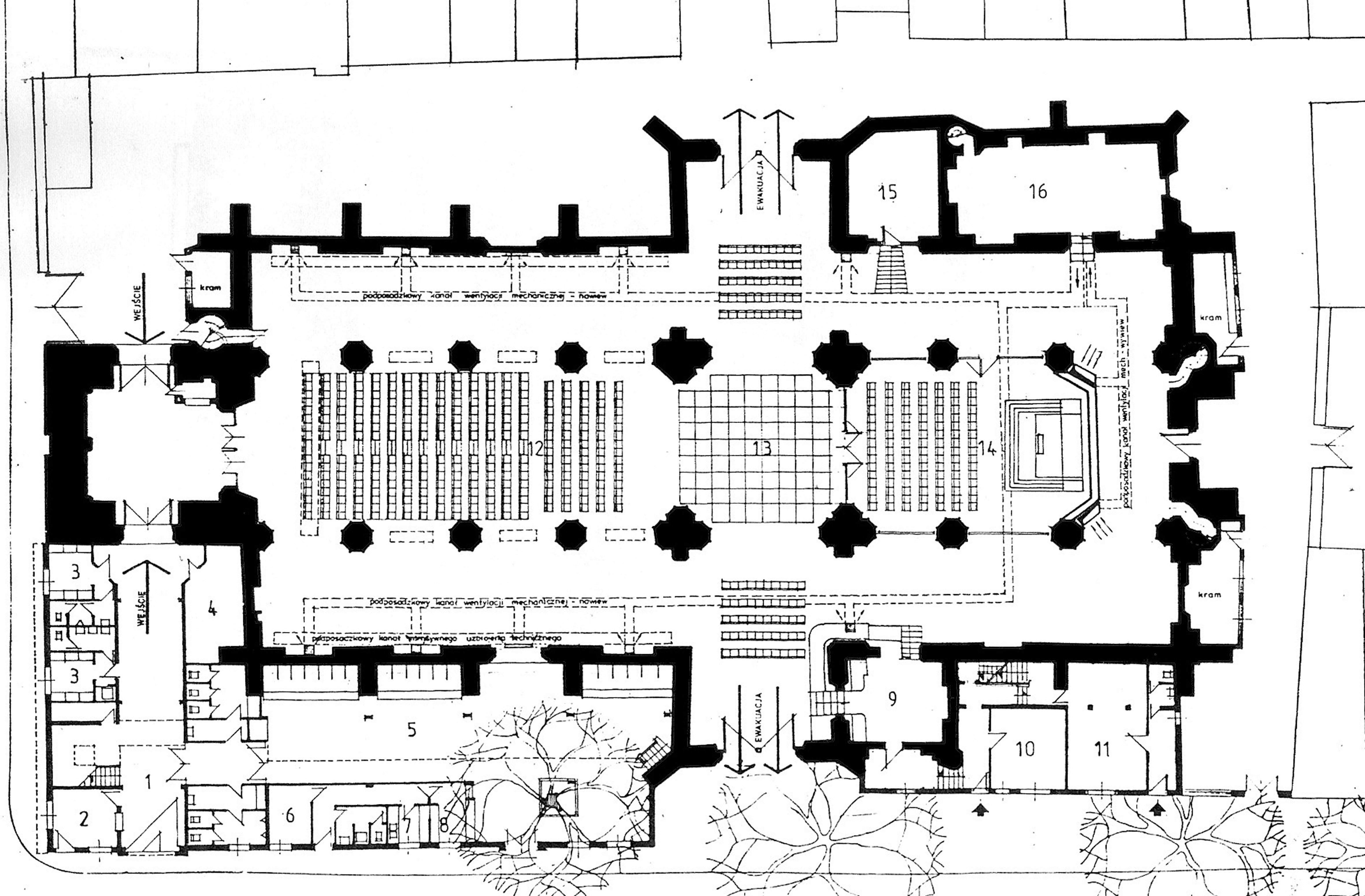 Rysunek z projektu adaptacji kościoła wraz z otoczeniem na Międzynarodowe Centrum Kulturalno-Kongresowe